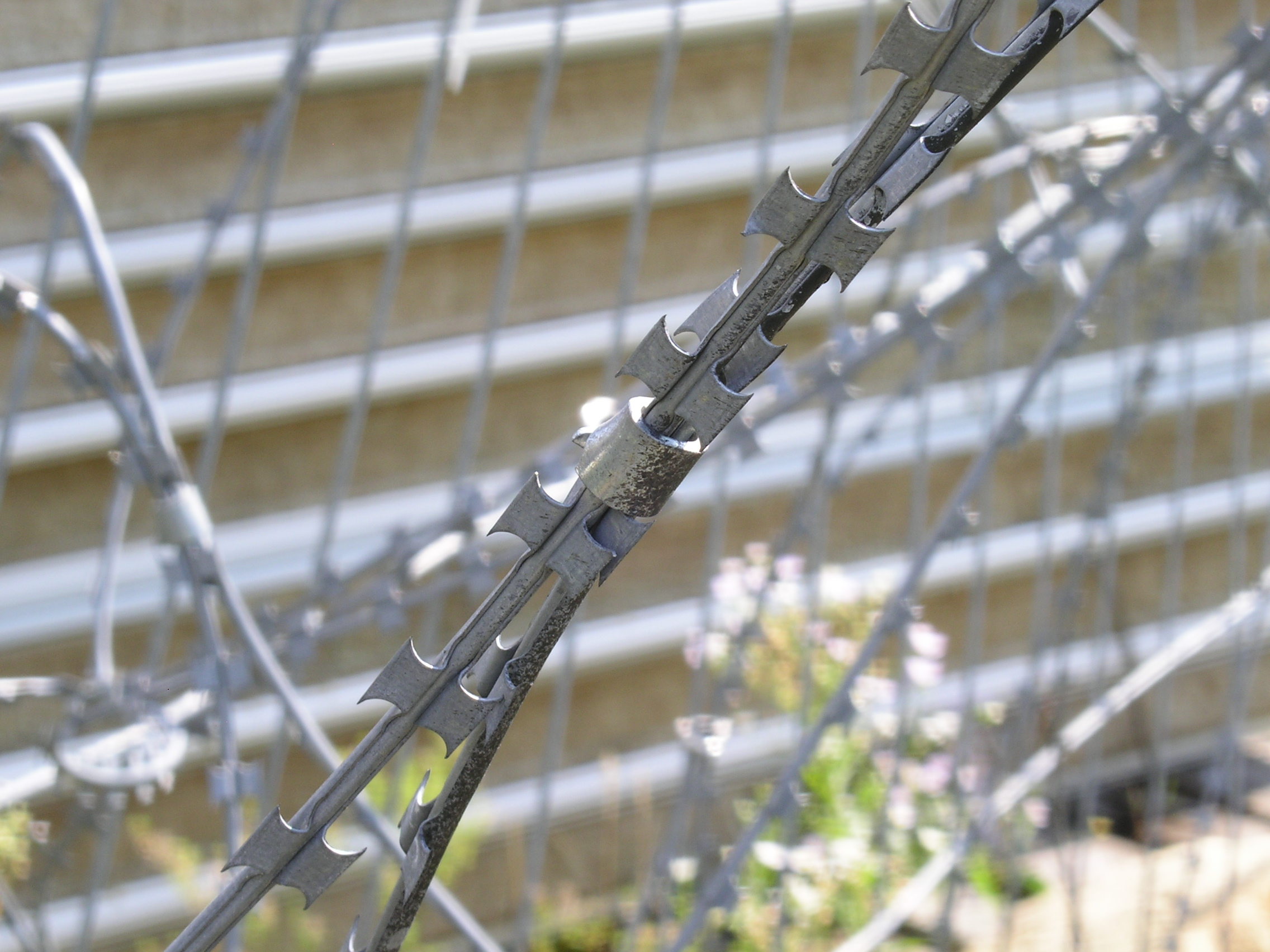 Detail žiletkového ostnatého drátu. Note the reinforcement wire embedded in the middle.